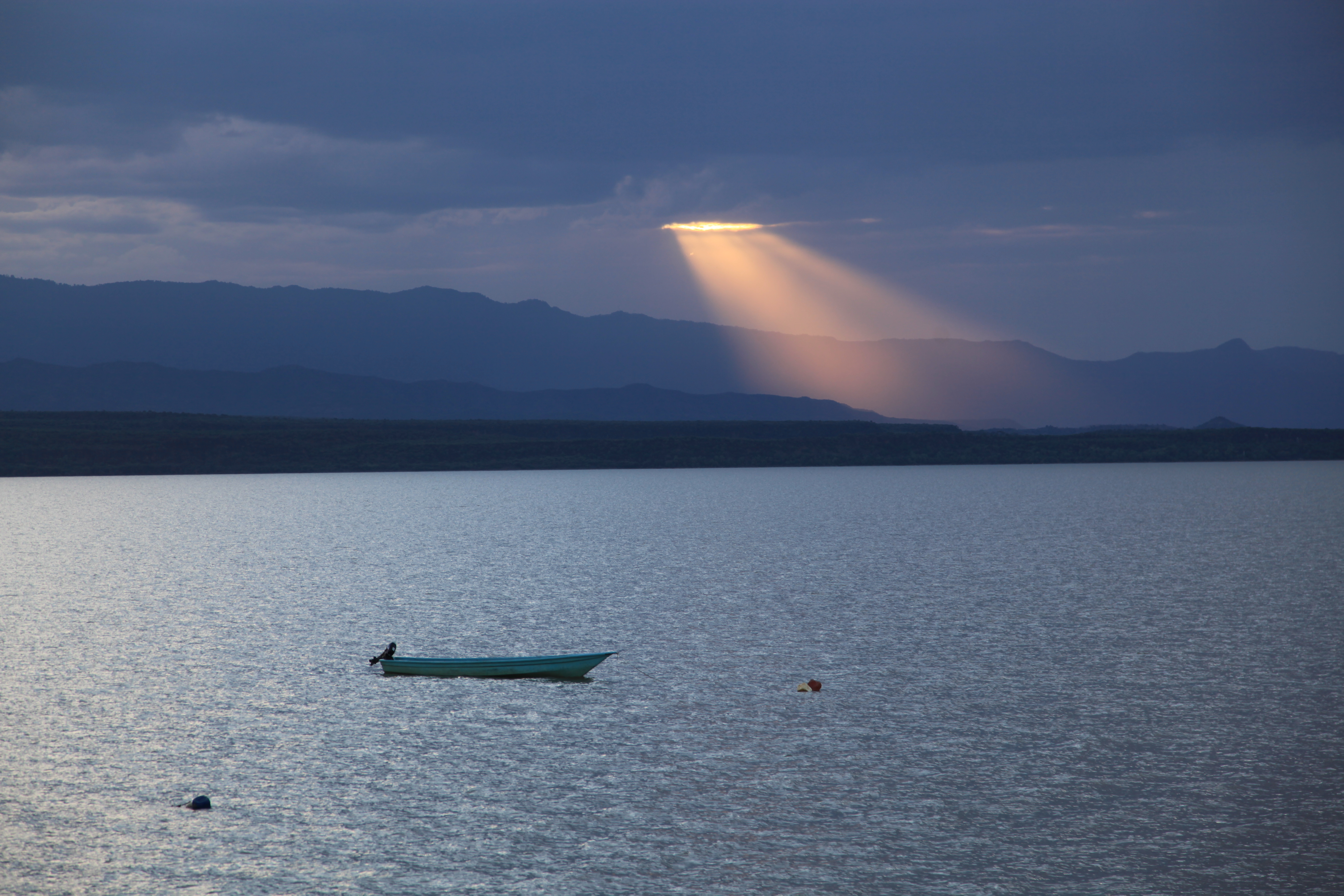 May 2009, Kenya. Beautiful sunset - photo taken from Samatian Island in Lake Baringo